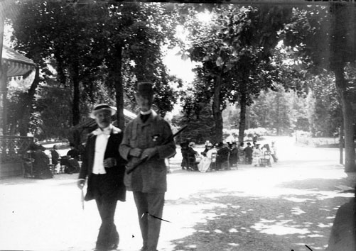 Fonds Trutat - Photographie ancienne Cote : TRU C 2 Localisation : Fonds ancien Original non communicable Titre : M.M. Russel et de Lassus, Luchon, le 28 août 1895 Auteur : Trutat, Eugène Rôle de l’auteur : Photographe Lieu de création : Bagnères-de-Luchon (Haute-Garonne) Date de création : : 1895 Mesures : 9 x 7 cm Mot(s)-clé(s) : -- Jardin public -- Promenade -- Kiosque -- Homme -- Bourgeoisie -- Chapeau -- Arbre -- Costume masculin -- Parc (public) -- Russel -- Lassus , de -- Bagnères-de-Luchon (Haute-Garonne) -- Pique (France ; vallée) -- Pyrénées (France) -- 19e siècle, 4e quart Médium : Photographies -- Négatifs sur plaque de verre -- Noir et blanc -- Portraits Bibliothèque de Toulouse. Domaine public